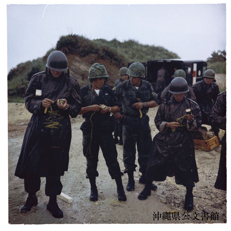 キャンプ・ハーディー 陸軍特殊部隊 (1) 1967年 6月